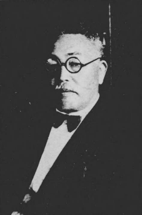 佐瀬 剛